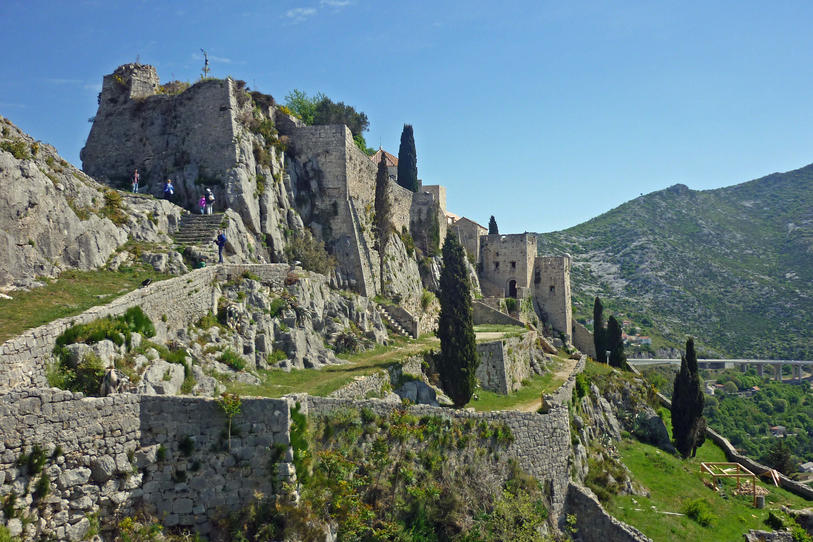 Festung Klis (Clissa), von 1537 bis 1648 türkisch: Festungsmauern und drittes Burgtor